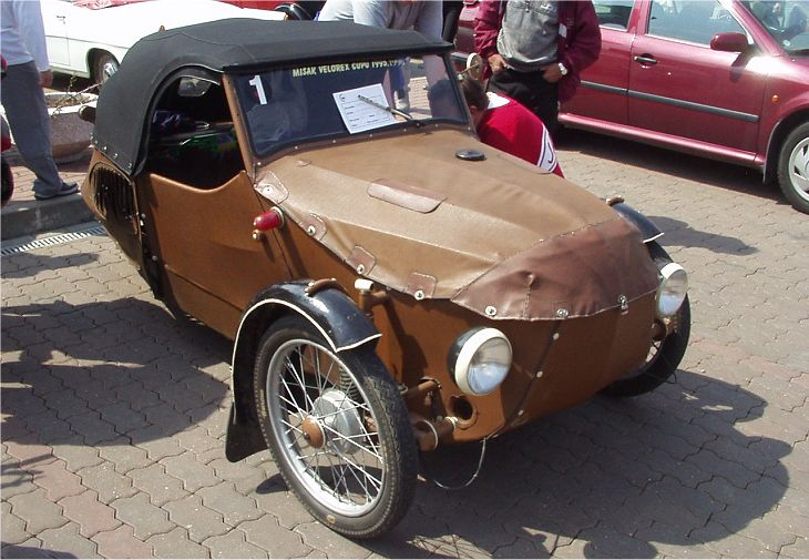 Velorex oskar 250, Lipnice nad Sazavou (Csehország)